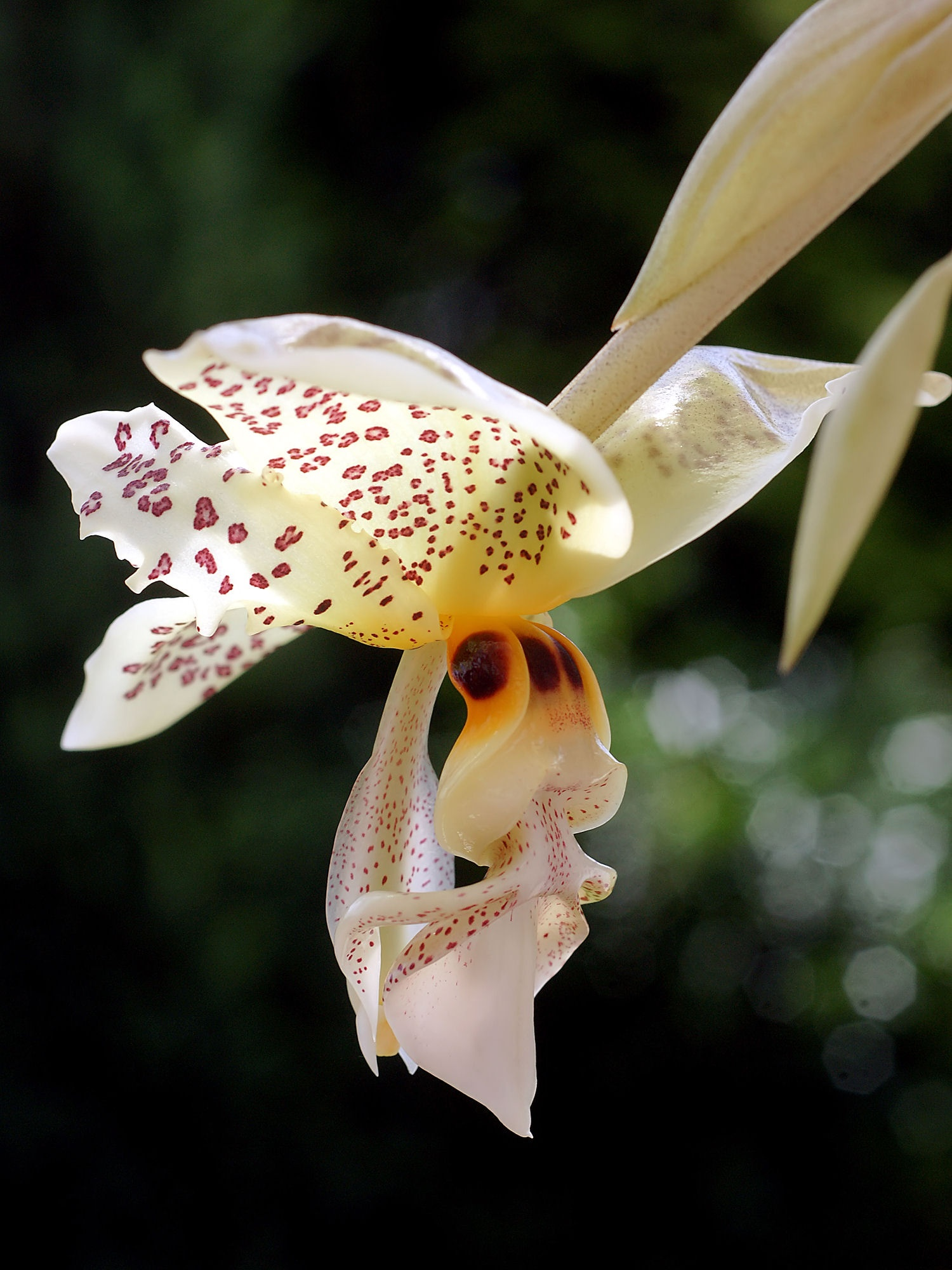 Stanhopea gibbosa